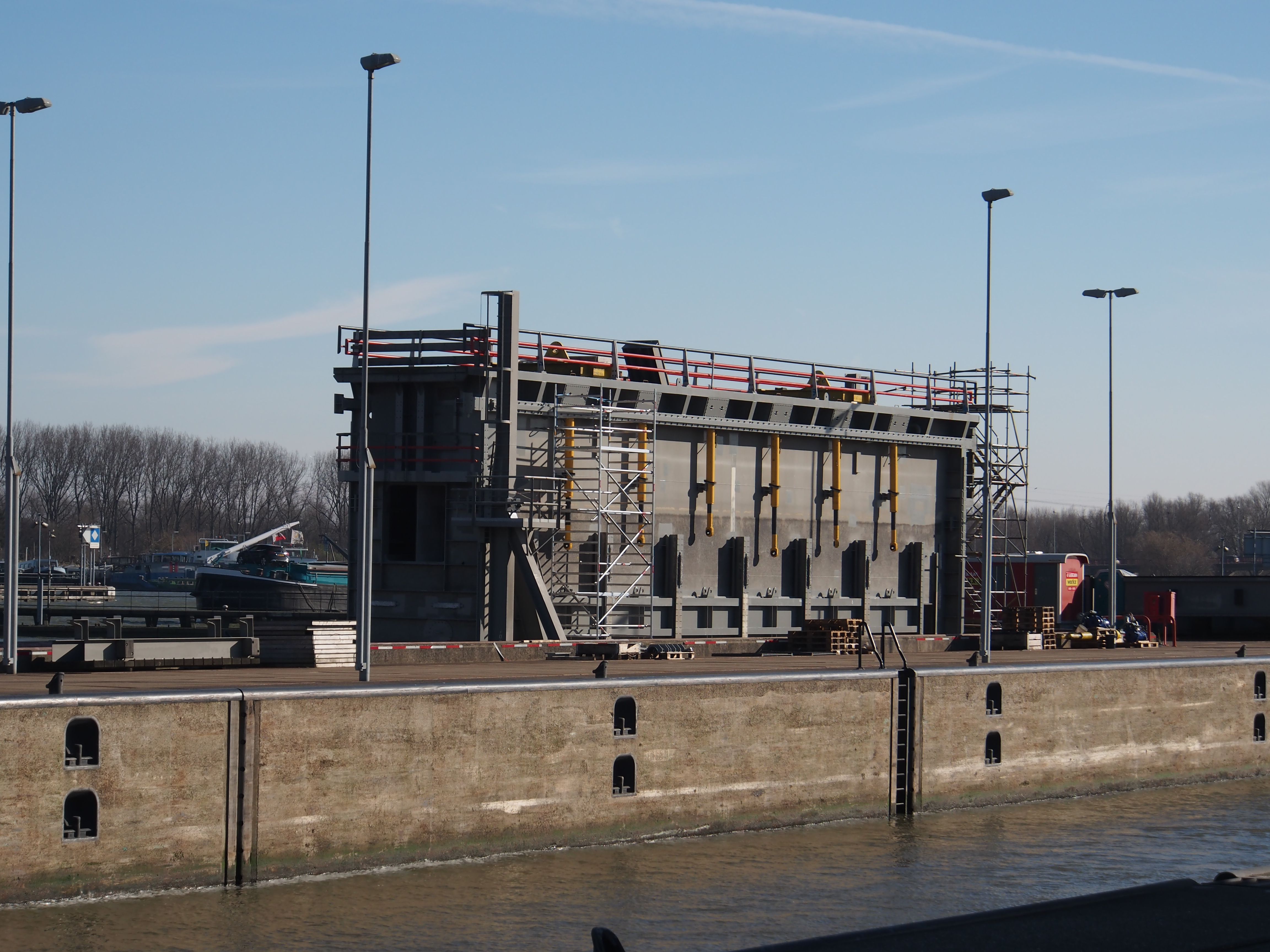 Oranjesluizen, Amsterdam.